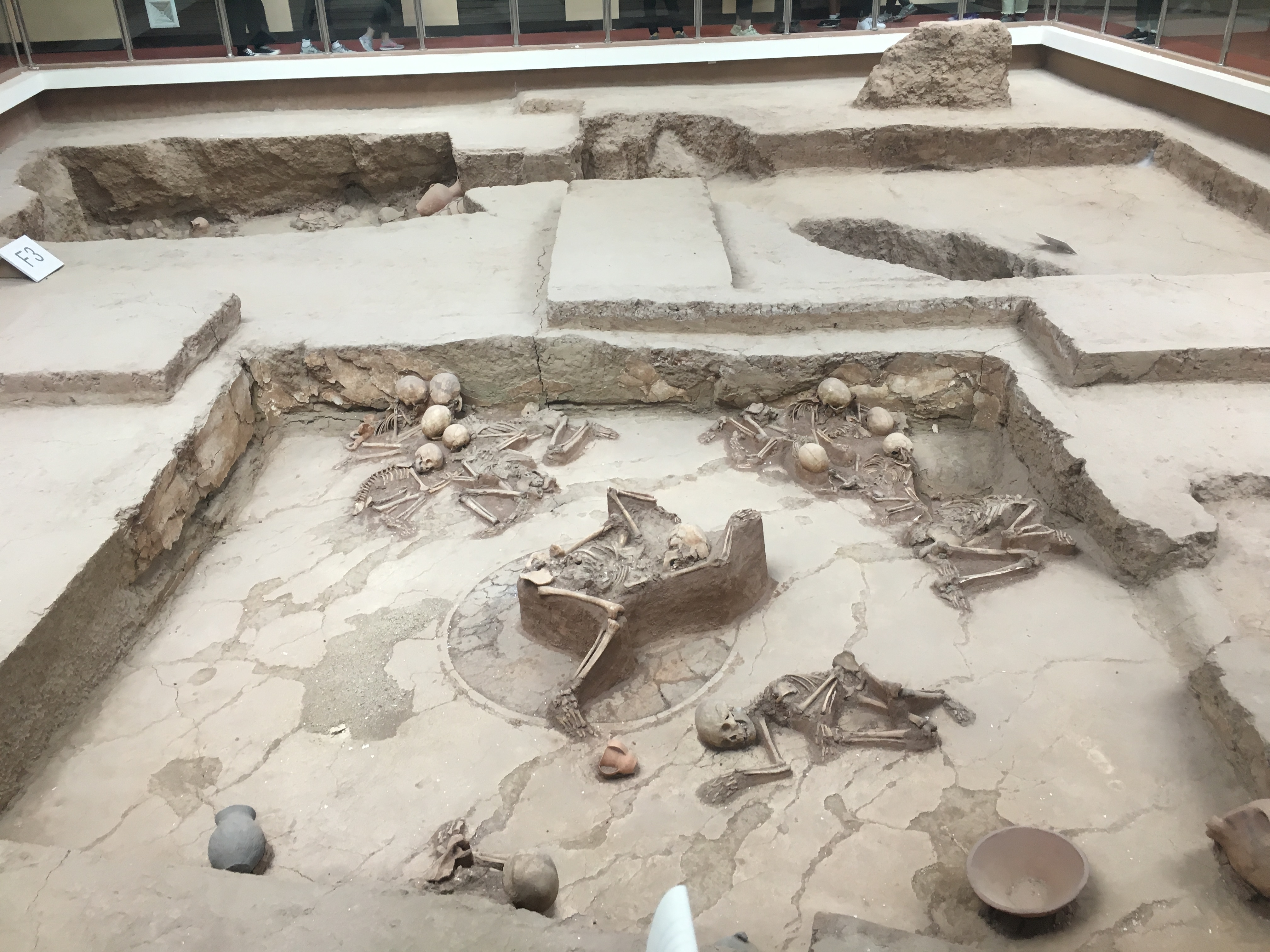 青海喇家遺址